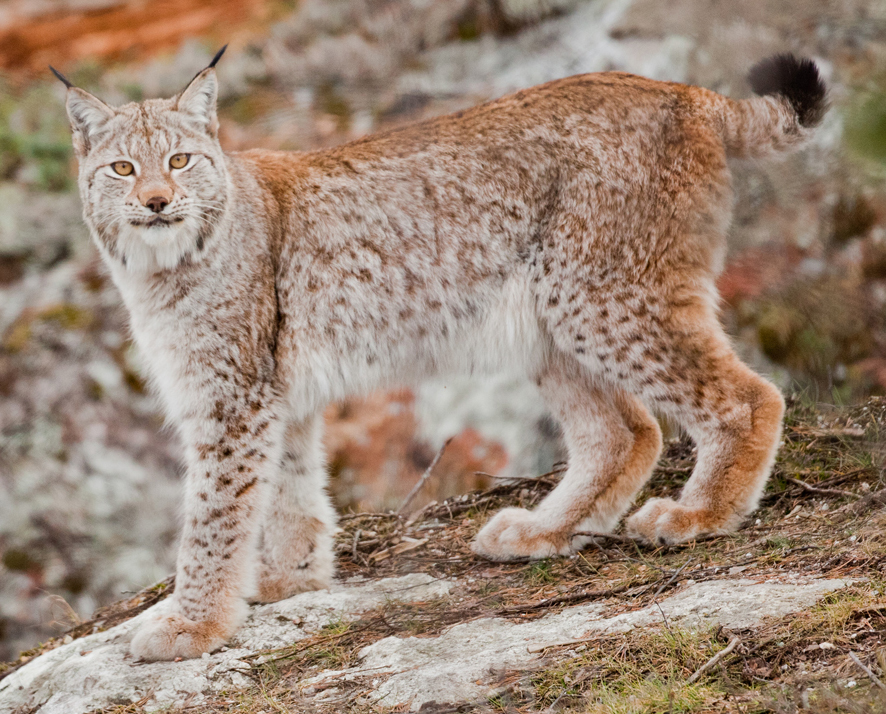 Gaupe